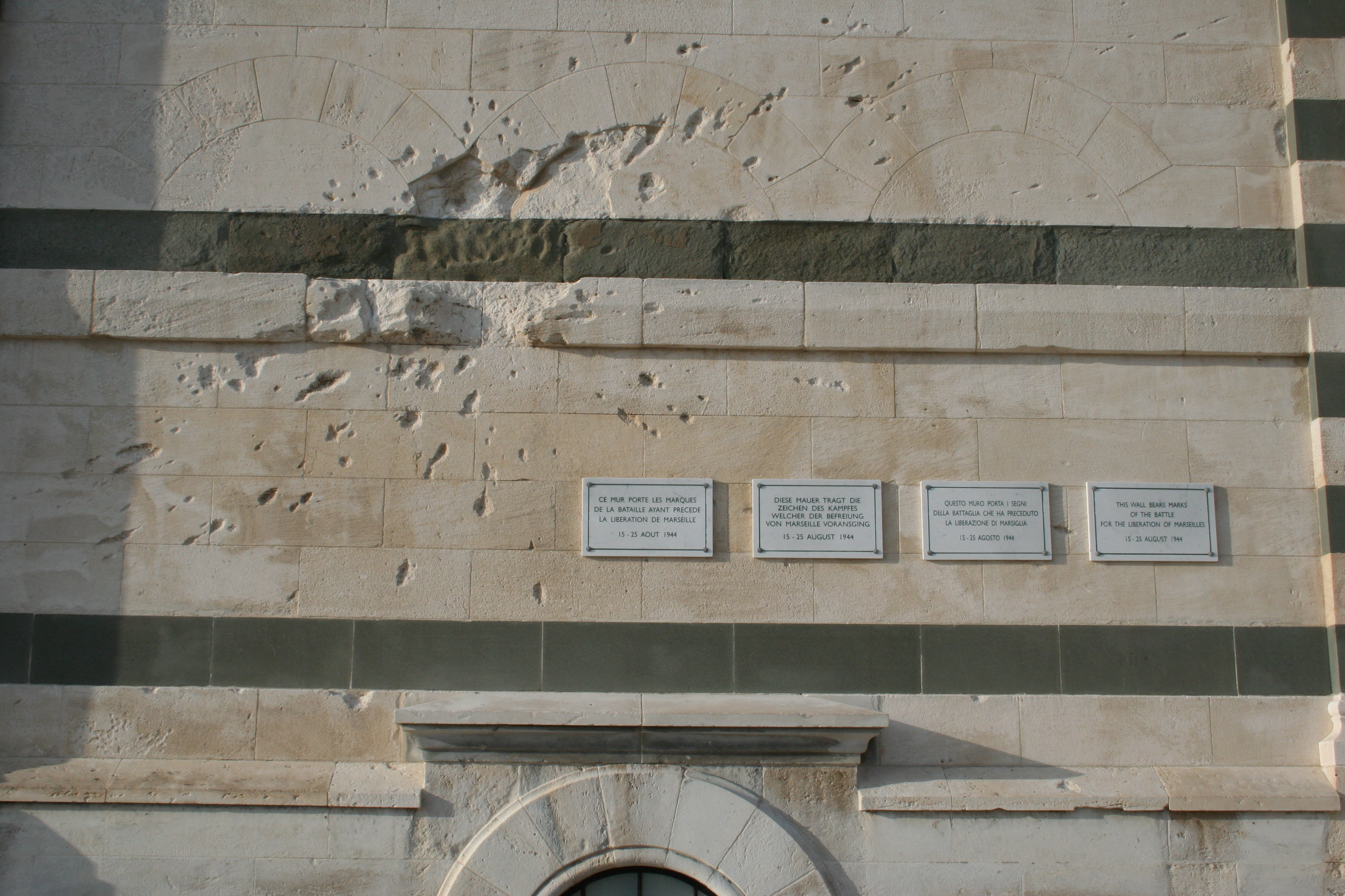 Impact d'obus de la deuxième guerre mondiale sur un mur de Notre-Dame de la Garde à Marseille